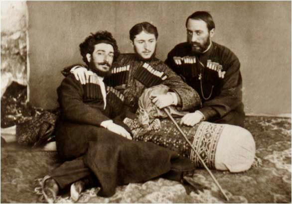 მამია გურიელი, გიორგი შერვაშიძე და ბესარიონ ბერიძე.